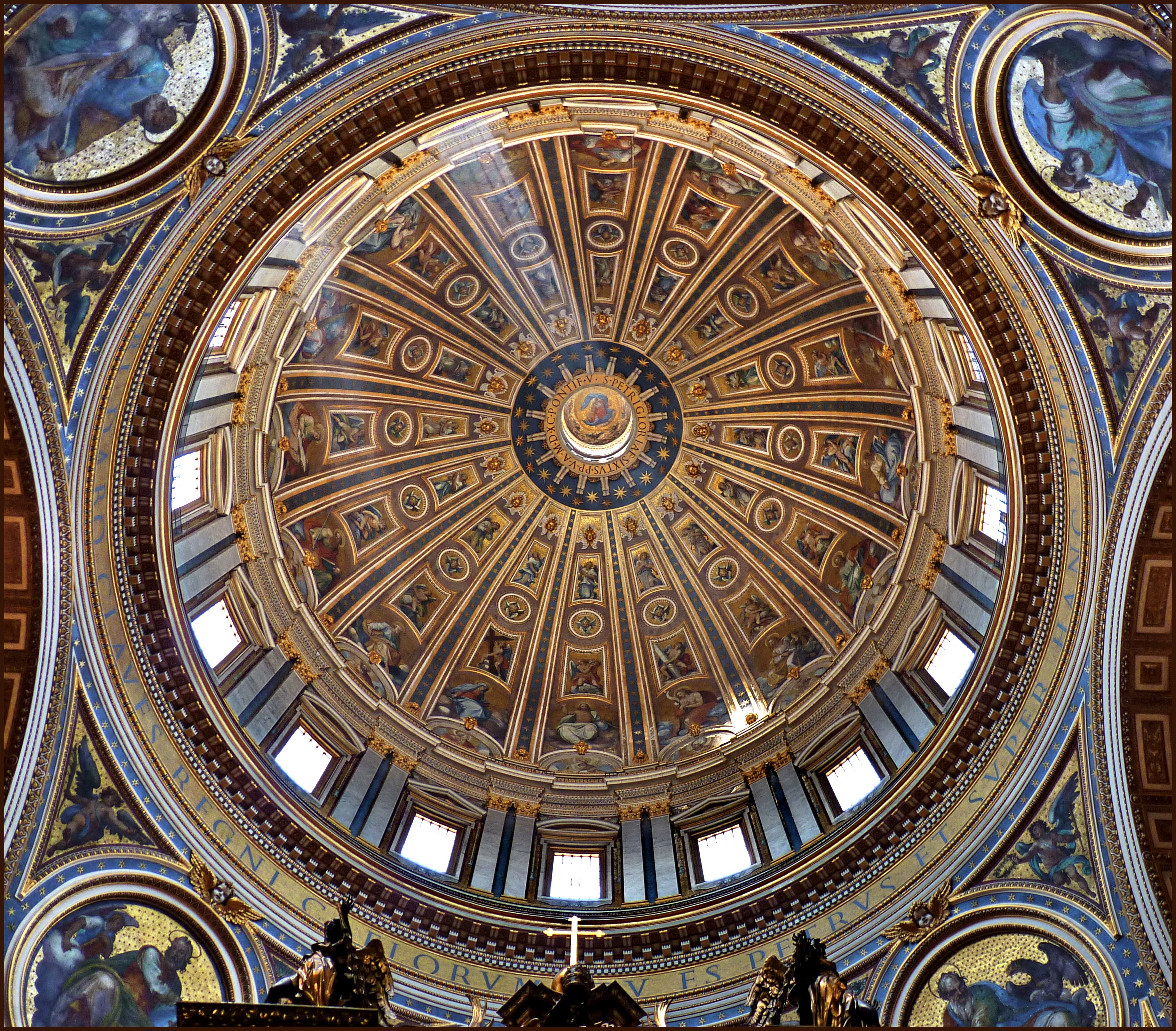 S. Pietro - Interno della cupola di Michelangelo